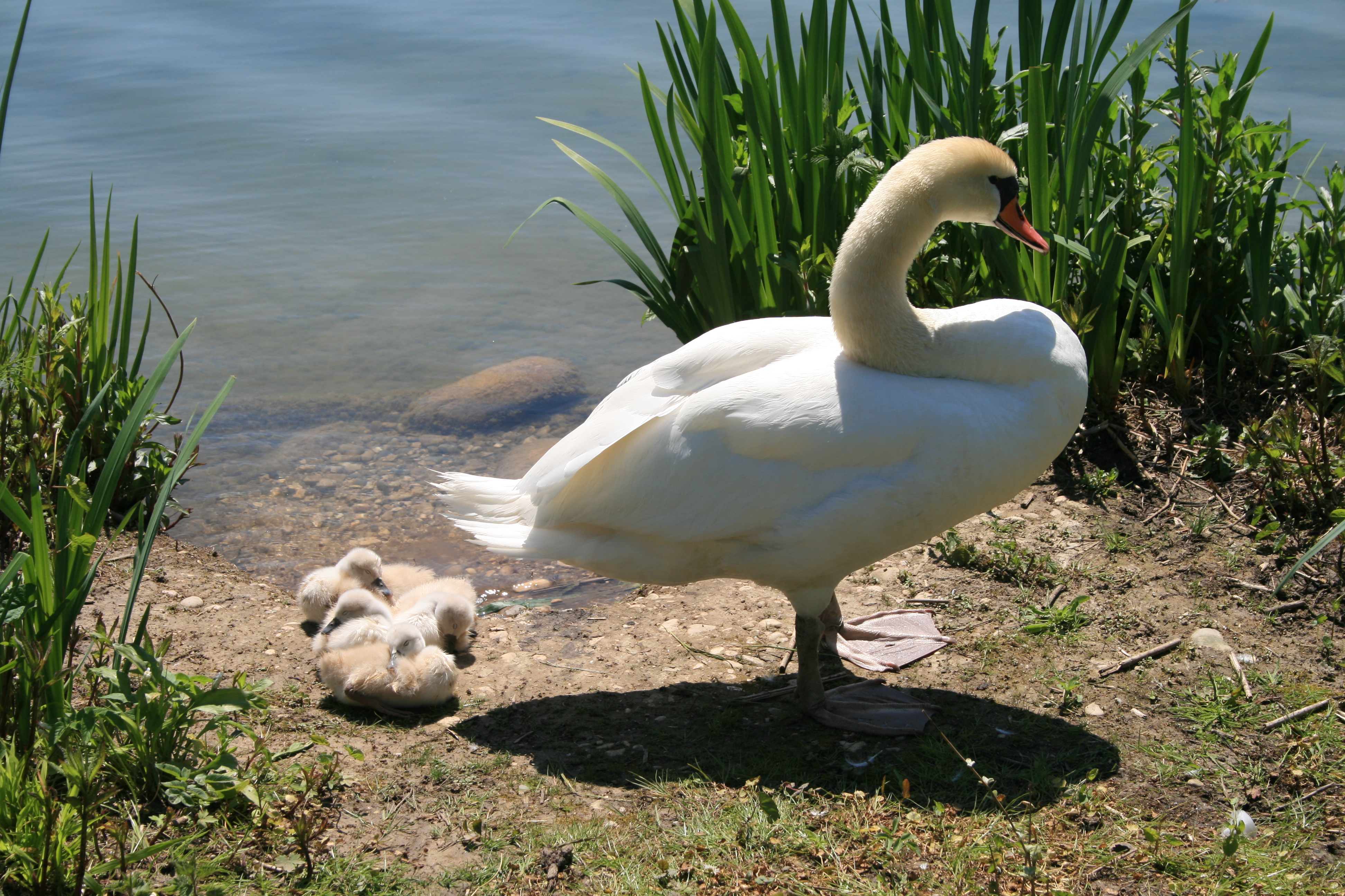 Höckerschwan mit Jungen